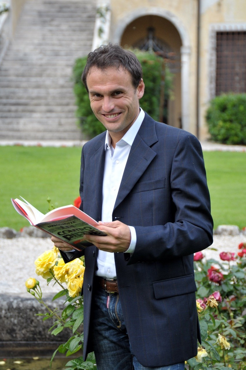 Don Marco Pozza